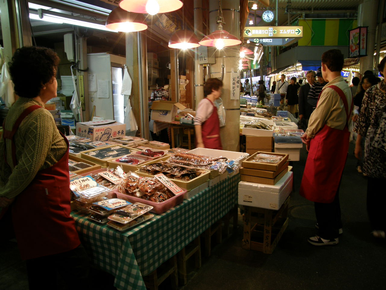 近江町市場（おうみちょういちば）は、石川県金沢市の中心部にある、主に生鮮食料品などの食品と生活雑貨を扱う小売店が主体の市場である。名前の由来は近江商人が作ったことによる[1]。地元ではおみちょ（「お」にアクセント）と呼び親しまれている。 市街地再開発事業により、2009年4月16日に近江町いちば館が開業した。むさし交差点（武蔵ヶ辻）の南東側一帯に位置し、繁華街の香林坊からも比較的近い。約2,8haの敷地に約170店の商店・飲食店が軒を連ねる。加賀蓮根、丸大根、金時草（きんじそう）などの加賀野菜を売っている店があり、加賀・能登の海産物や加工品なども揃う。